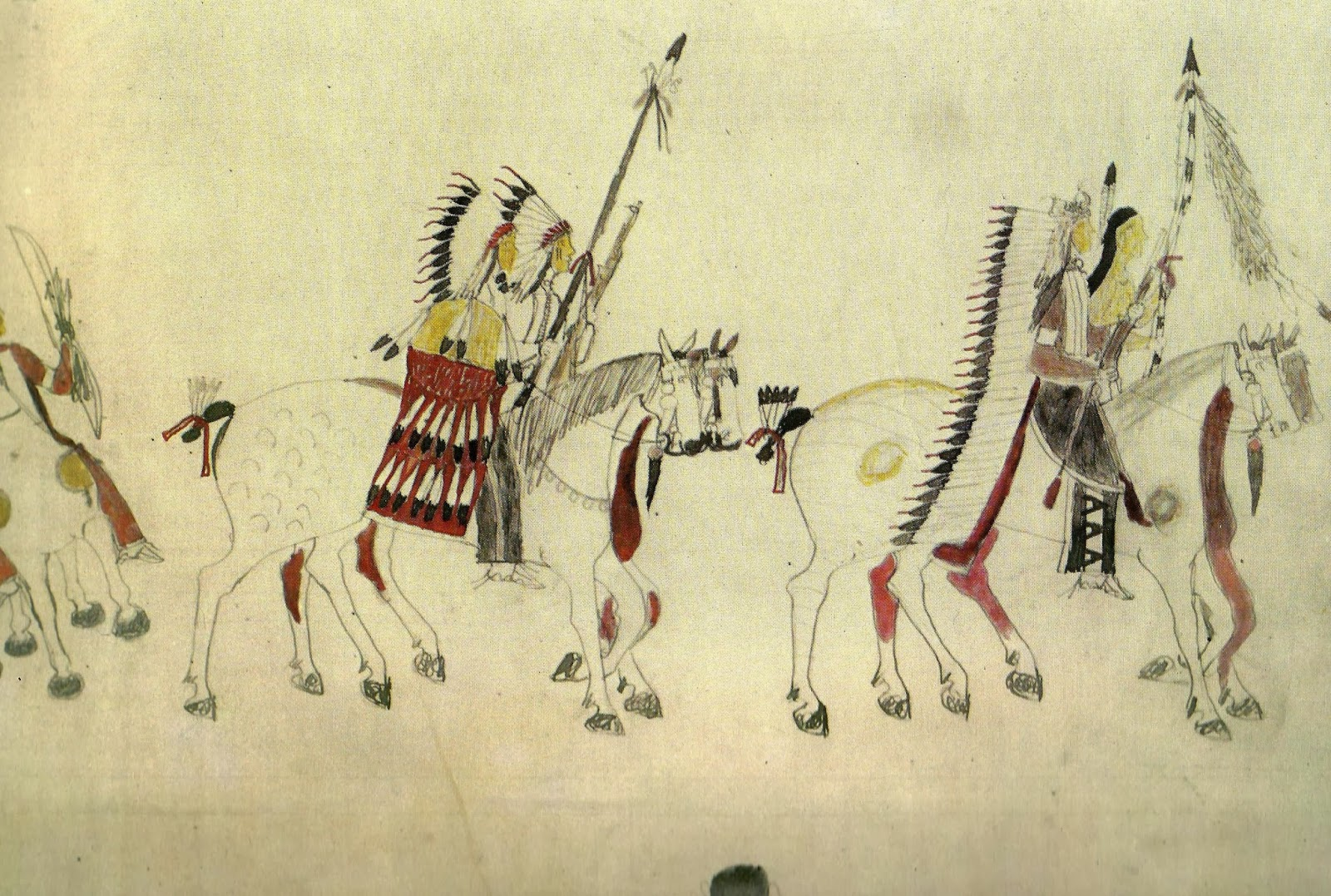 Paradierende Krieger auf Pferden, gezeichnet und gemalt von dem Oglala-Lakota-Sioux Amos Bad Heart Bull (Tatanka Chante Shicha) nach 1890. (Von diesem Künstler sind 407 Bilder über die Geschichte seines Volkes bekannt, die er mit Tinte, Bleistift und Pastellfarben auf Papier geschaffen hat.)